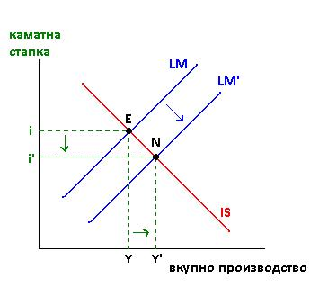 Зголемувањето на понудата на пари ја поместува LM кривата надесно и економијата ја поместува во точката N каде производството е зголемено на Y' и каматната стапка е намалена на i' .